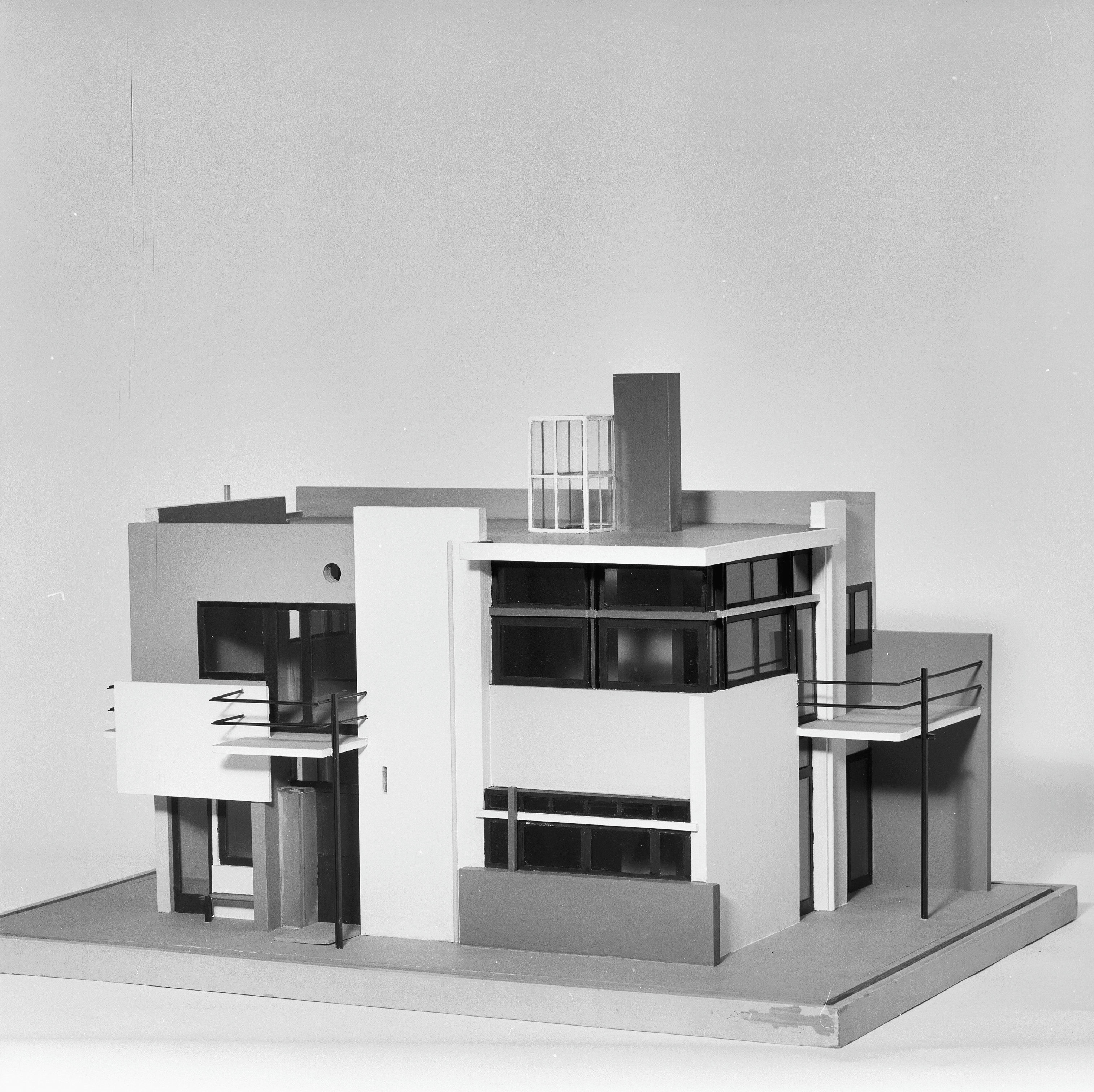 Rietveld-Schröderhuis: maquette, zuid-oost zijde Collectie Centraal Museum